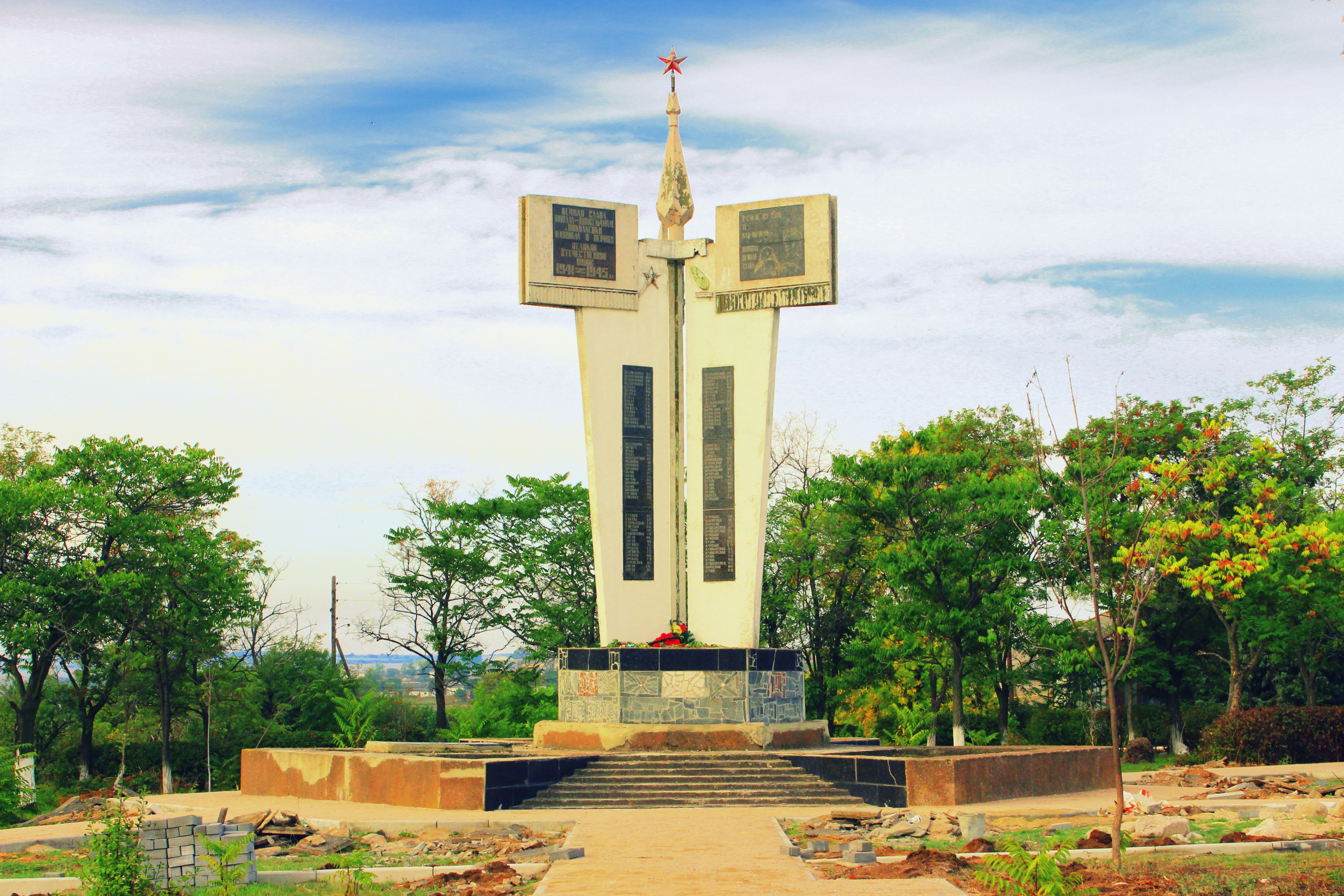 Пам'ятник воїнам-односельчанам, Волноваський район, Волноваський р-н Миколаївська с\р с. Миколаївка